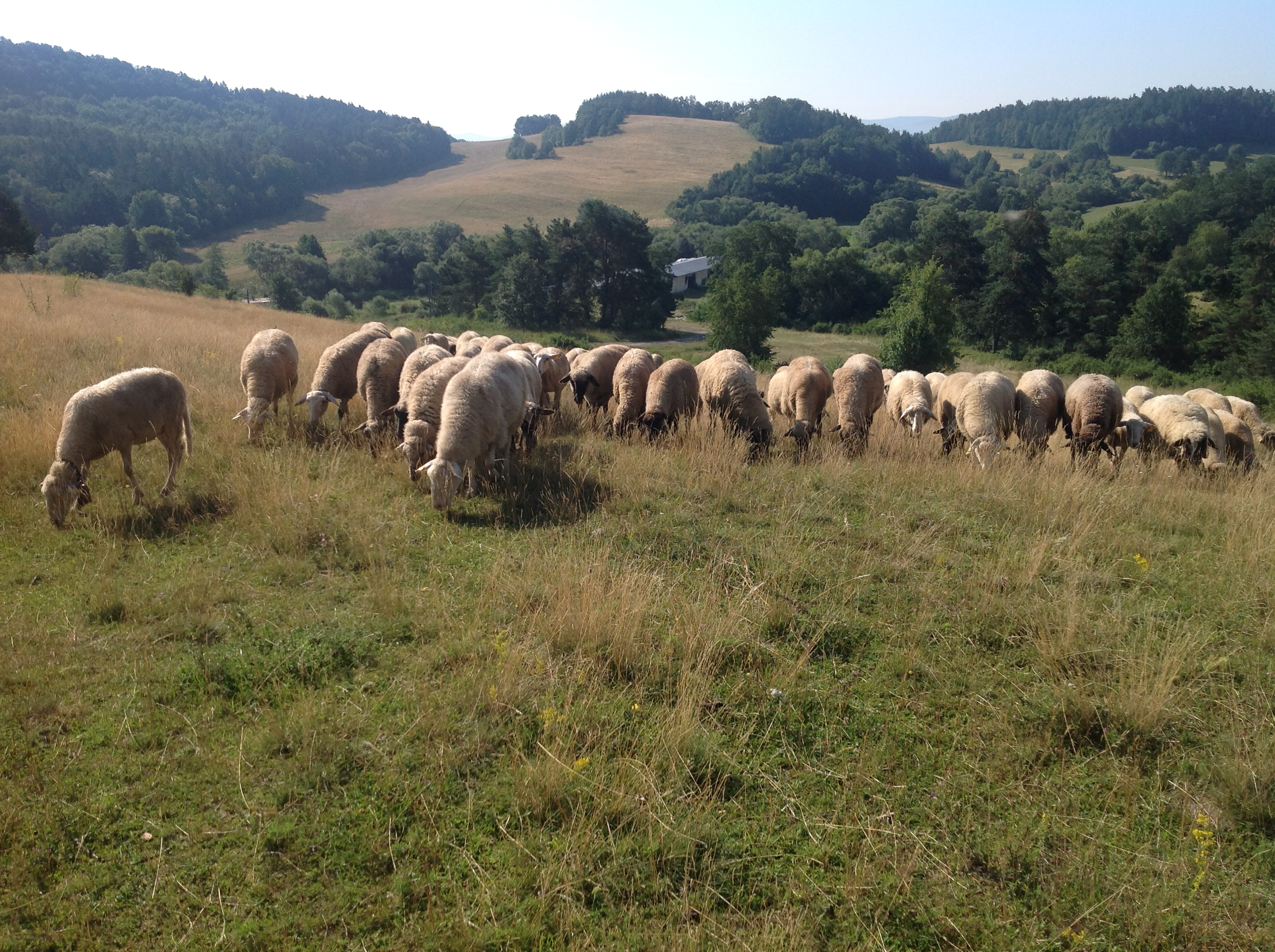 Samporské ovce